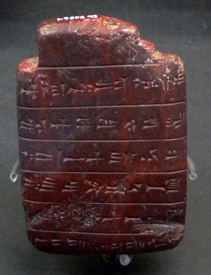 Schaffhausen, Museum zu Allerheiligen, Sammlung Ebnöther, (Abteilung "Schrift") Amulett (Stein, graviert und gebohrt), Höhe 6,6 cm; Syrien/Nordirak, neuassyrisch, 900–600 v. Chr.; hier abgebildet: Rückseite mit (verstümmelter) Beschwörungsformel; die Vorderseite zeigt die Dämonin Lamashtu auf einem Esel